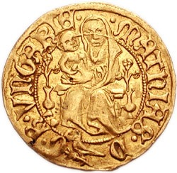 Mátyás aranyforintjának előlapja, melyre a korábbi címer helyett az ország védőszentje, a Patrona Hungariae került (+mATHIAS•D•G•R•VNGARIE,)